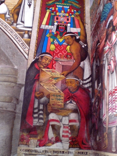 Autorretato propio de Desiderio Hernández Pintando La Diosa Del Maíz y viendo un antiguo Códice, Su Abuelo Se encuentra sentado junto a su padre que esta de Pie.